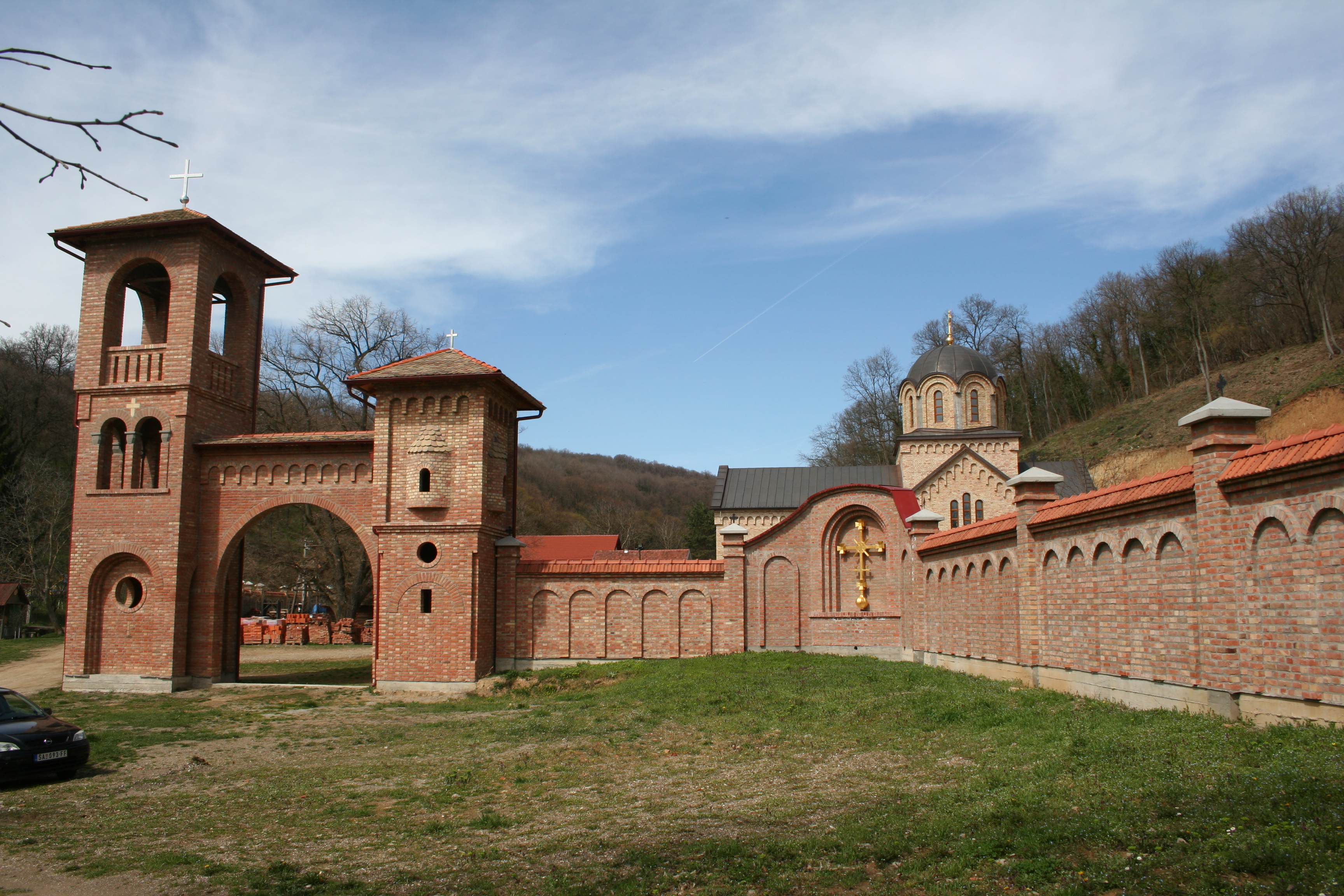 Manastir Bešenovo